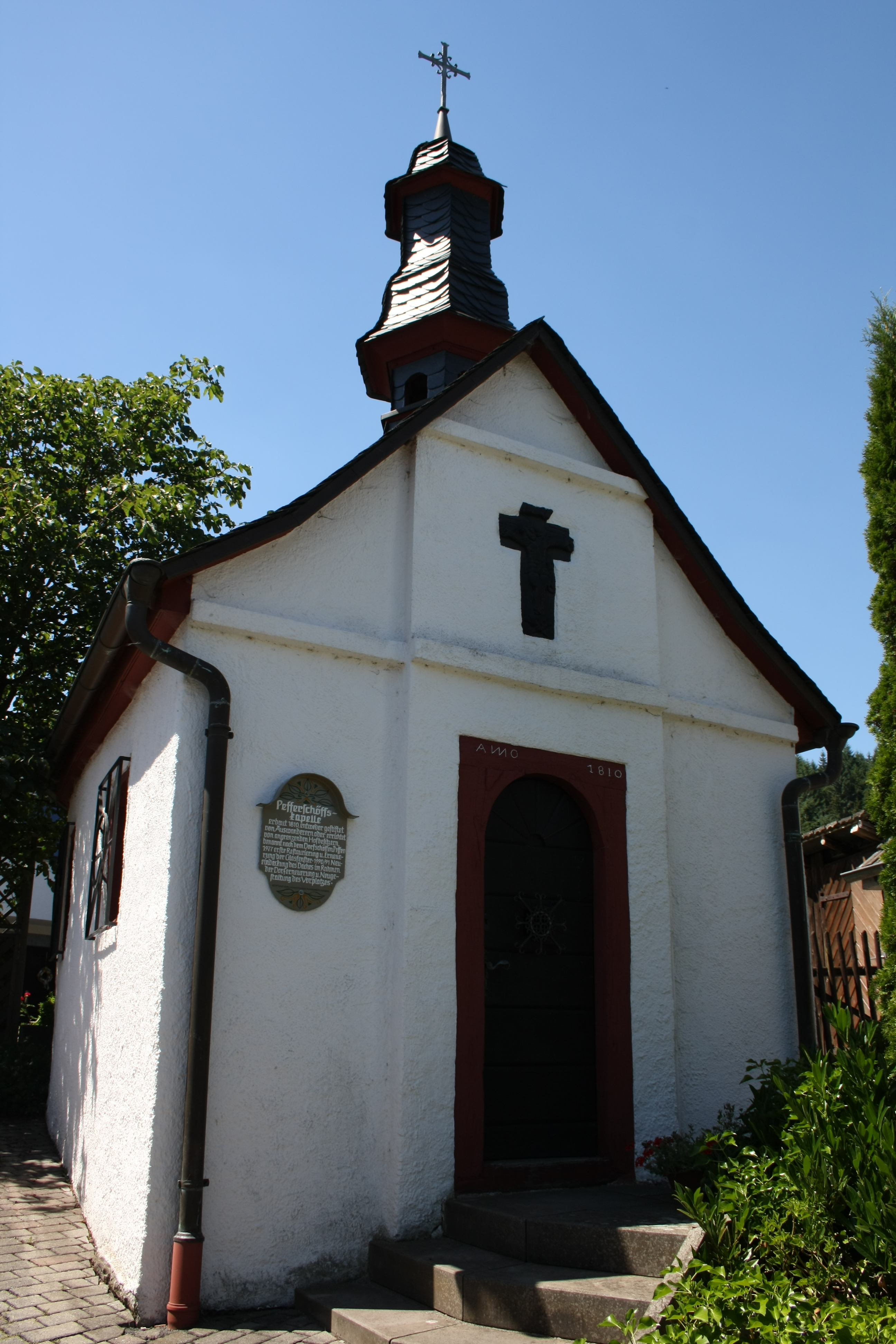 Pefferschöffkapelle in Wimbach, Portalseite